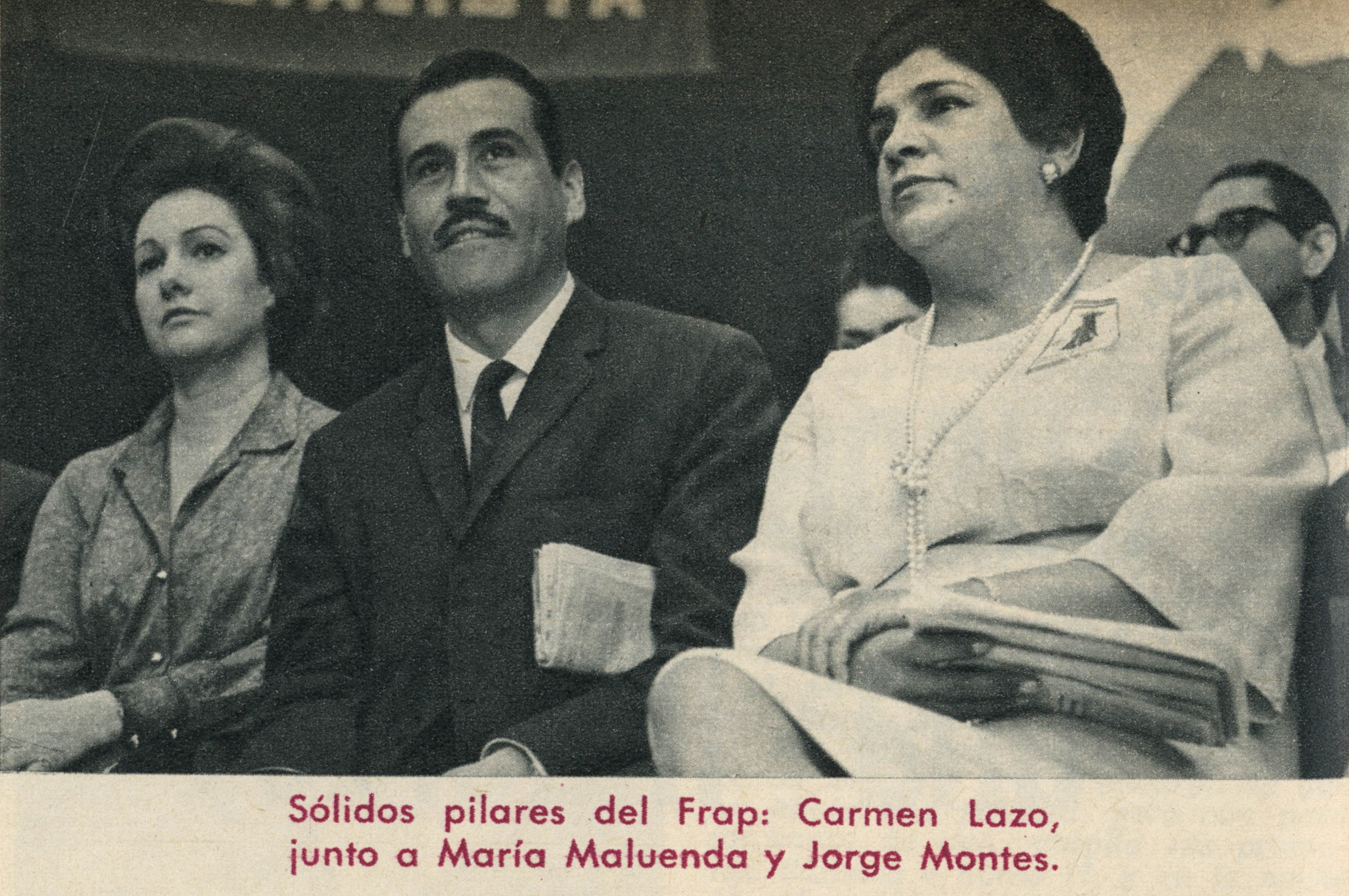 María Maluenda, Jorge Montes y Carmen Lazo: sólidos pilares del Frap.